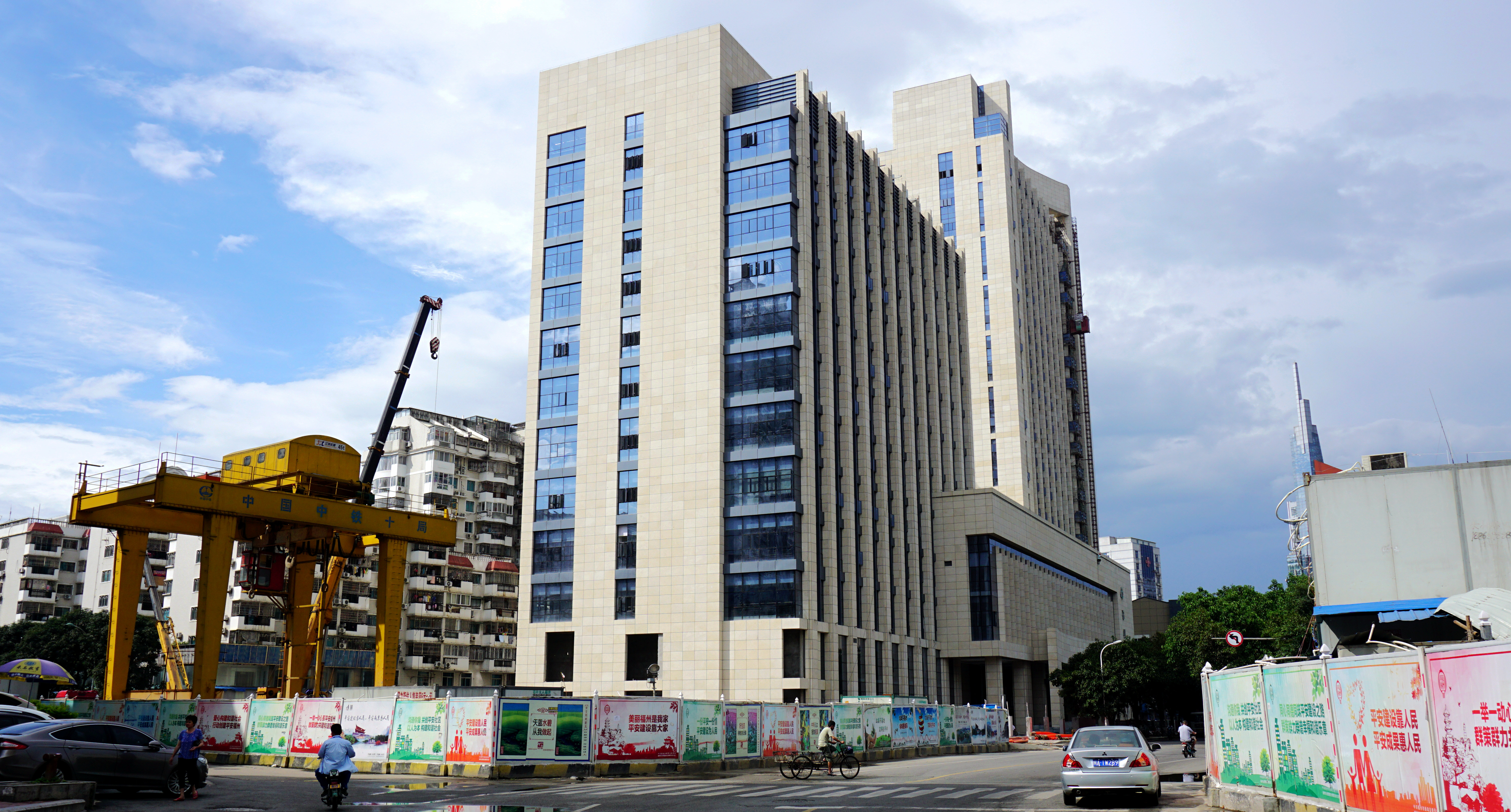 图中央为福州地铁大厦。修建中的达道站在其旁。摄于西历2016年5月。 文言: 居圖中者，福州地鐵大廈。达道之停在其廁，方築。攝於西曆二〇一六年五月。